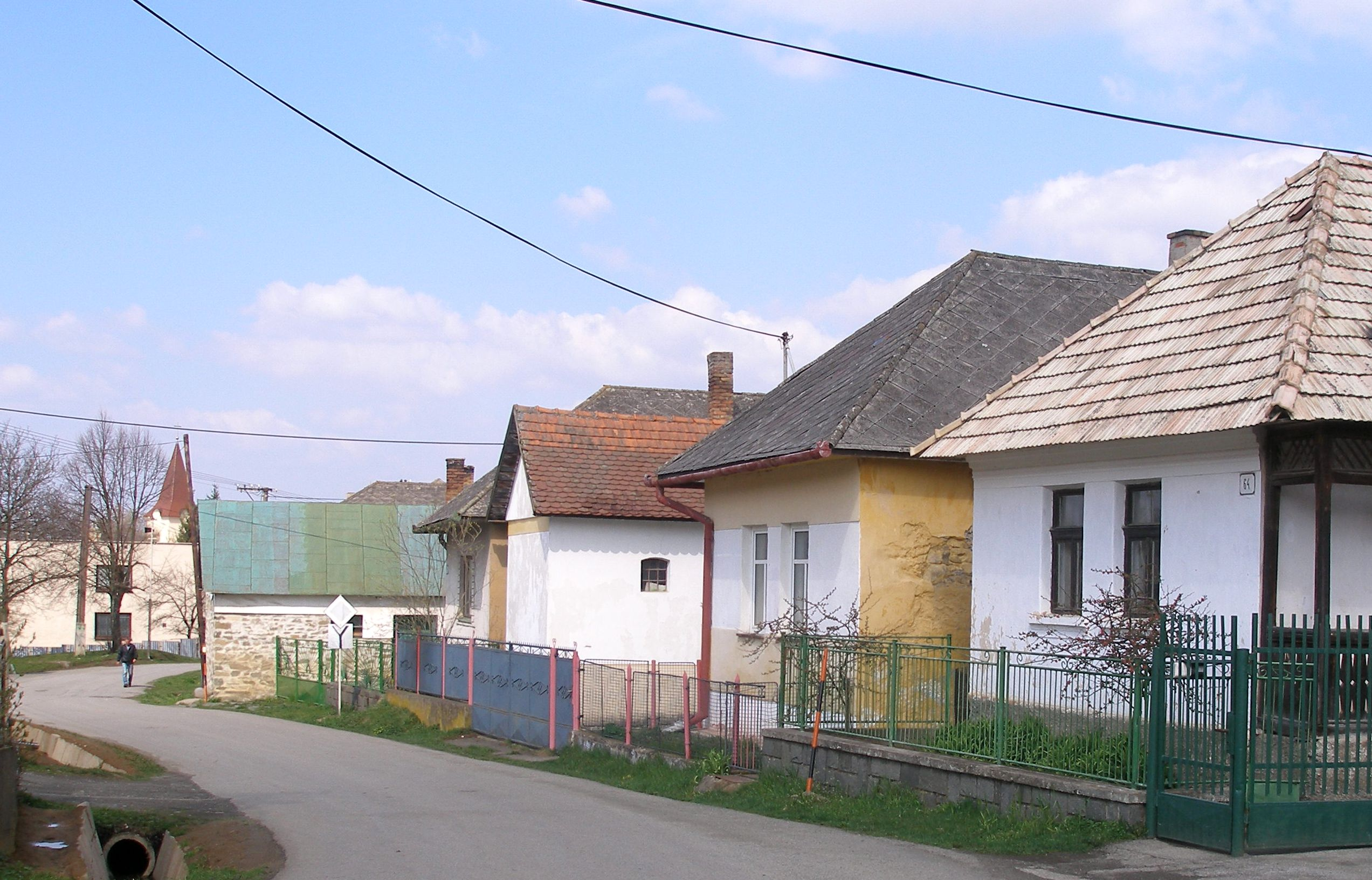 Obec Vyšná Šebastová okres Prešov, región Šariš